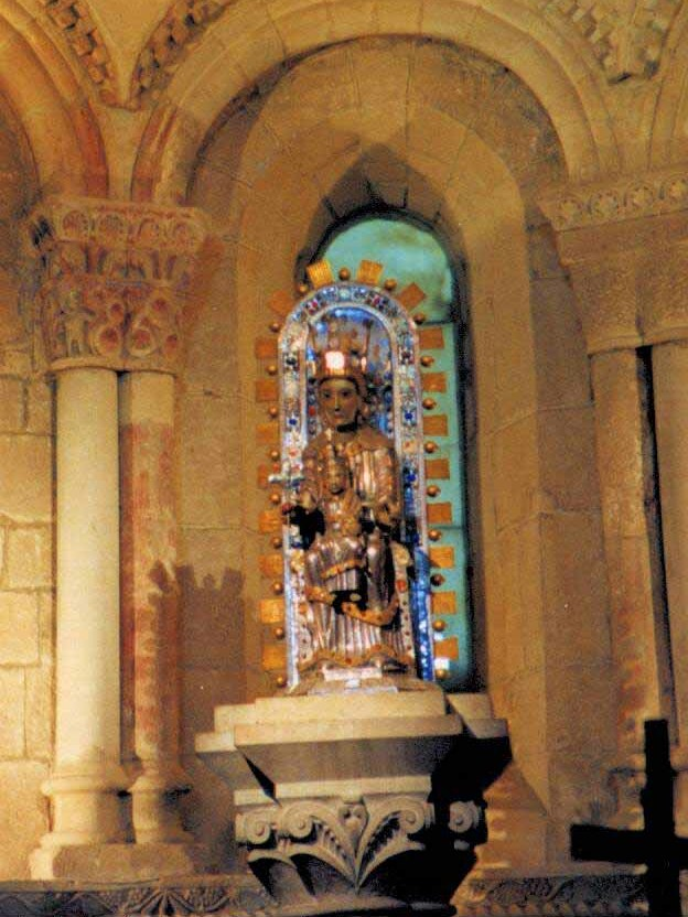 Ujué interior ábside Foto realizada por mí; la cedo a Wikipedia